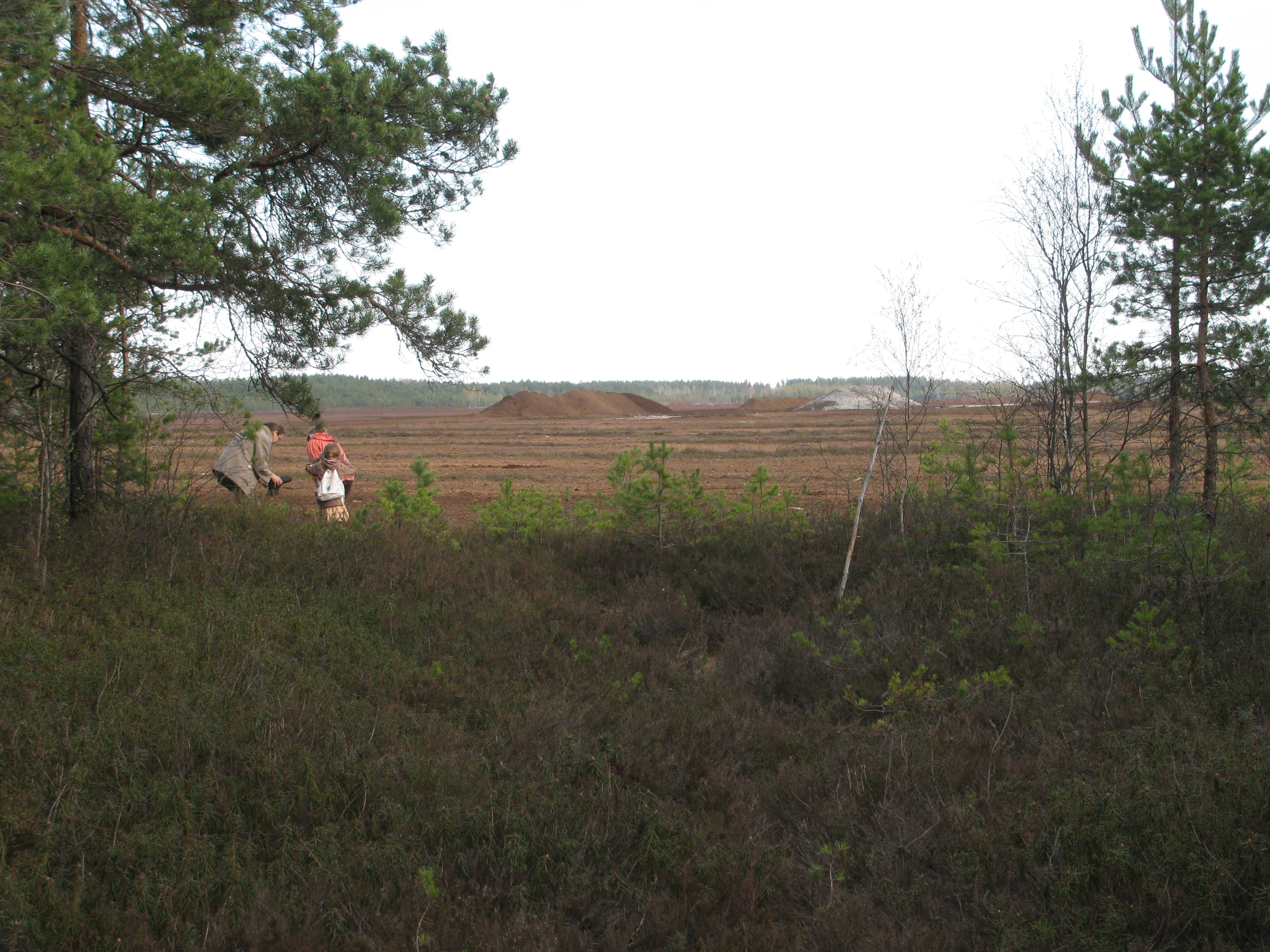 Matkajad Tõnumaa turbavälja ääres